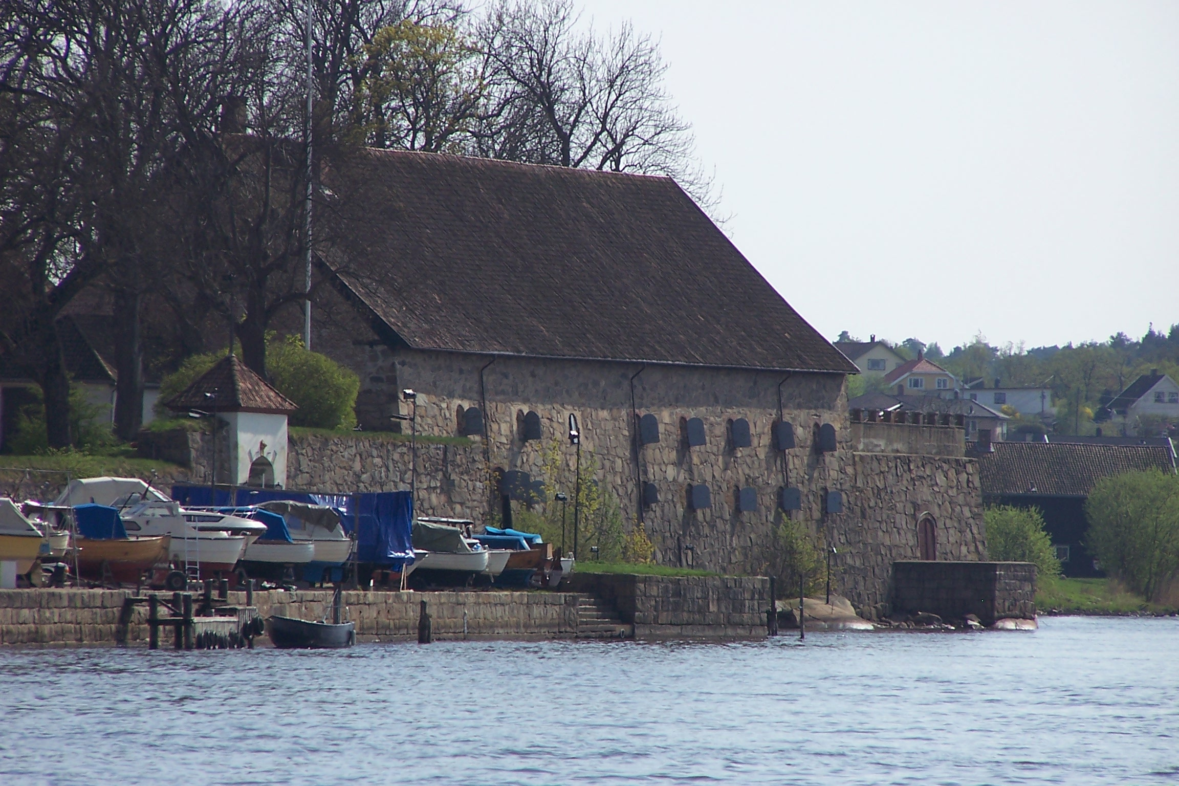 Det grunnmurede provianthus at Fredrikstad Fortress, Fredrikstad, Norway